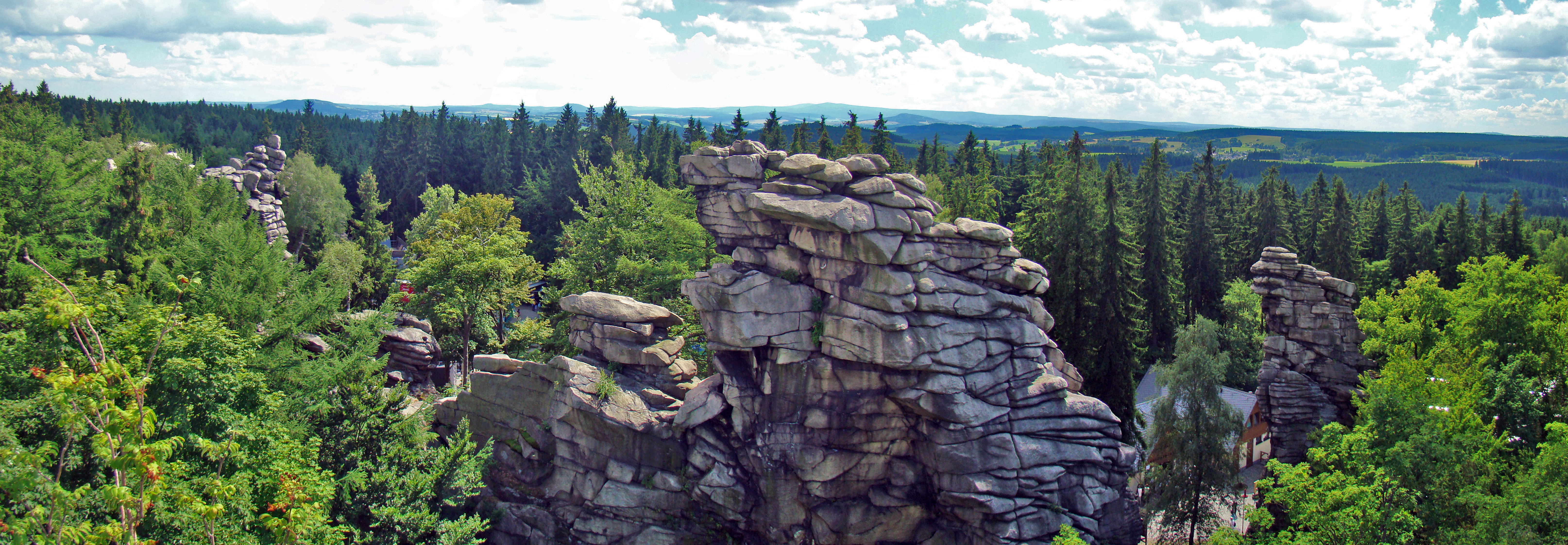 Panoramablick über das Naturtheater Greifensteine